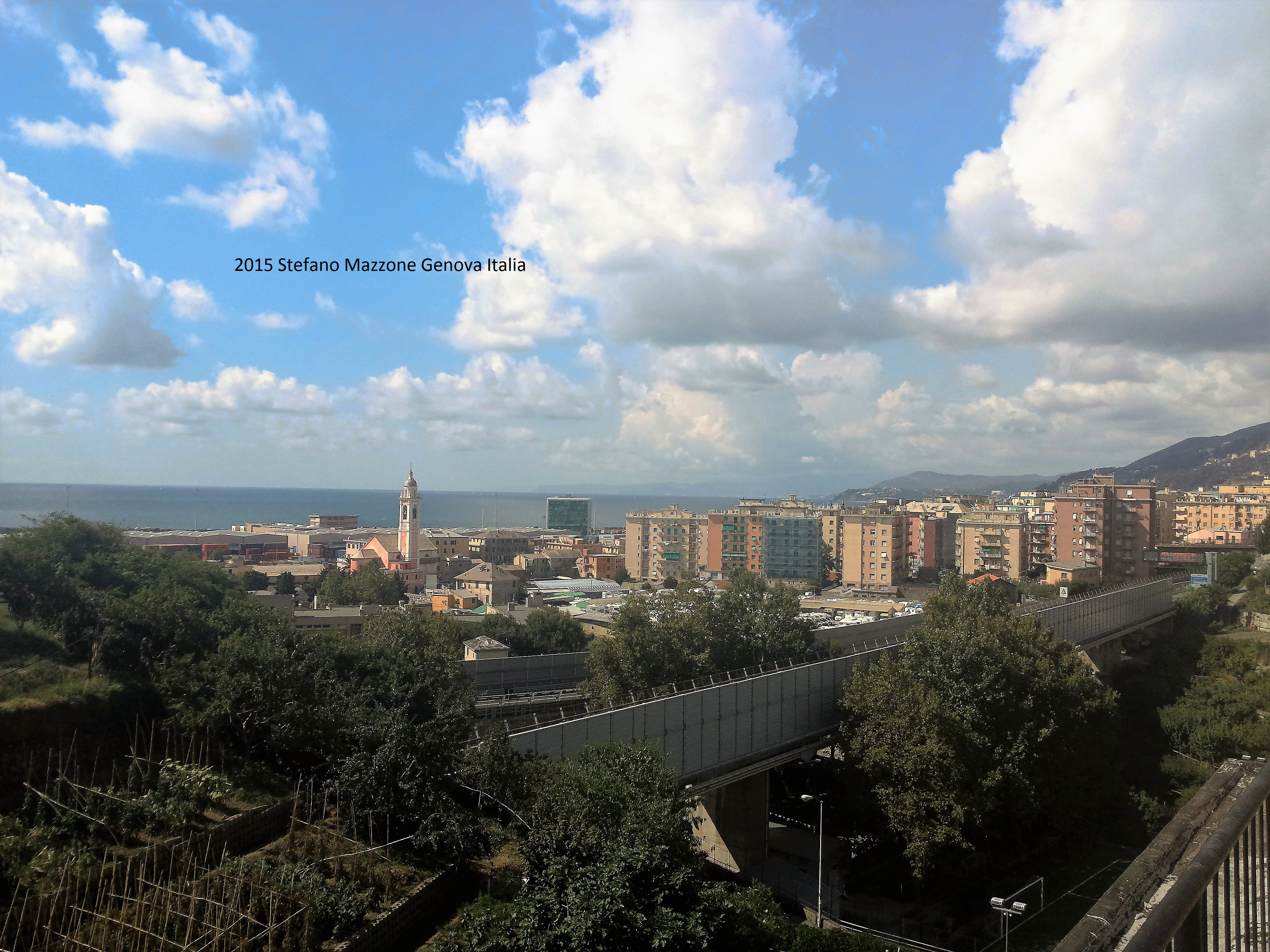 Pra', 16157 Genova, Italy